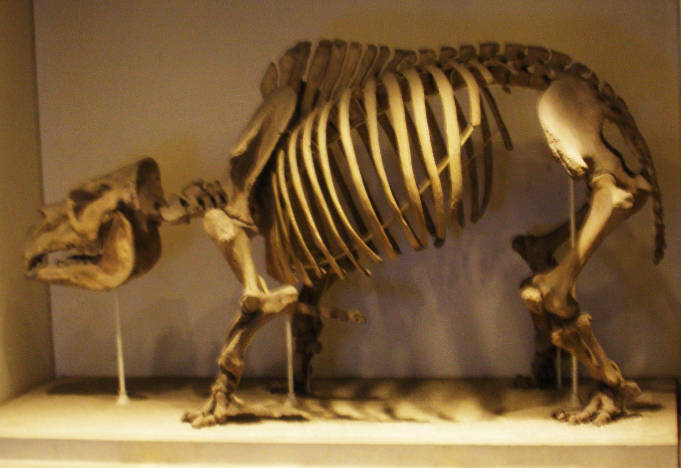 Fossil of Toxodon, an extinct mammal-- Took the photo at Natural History Museum, London